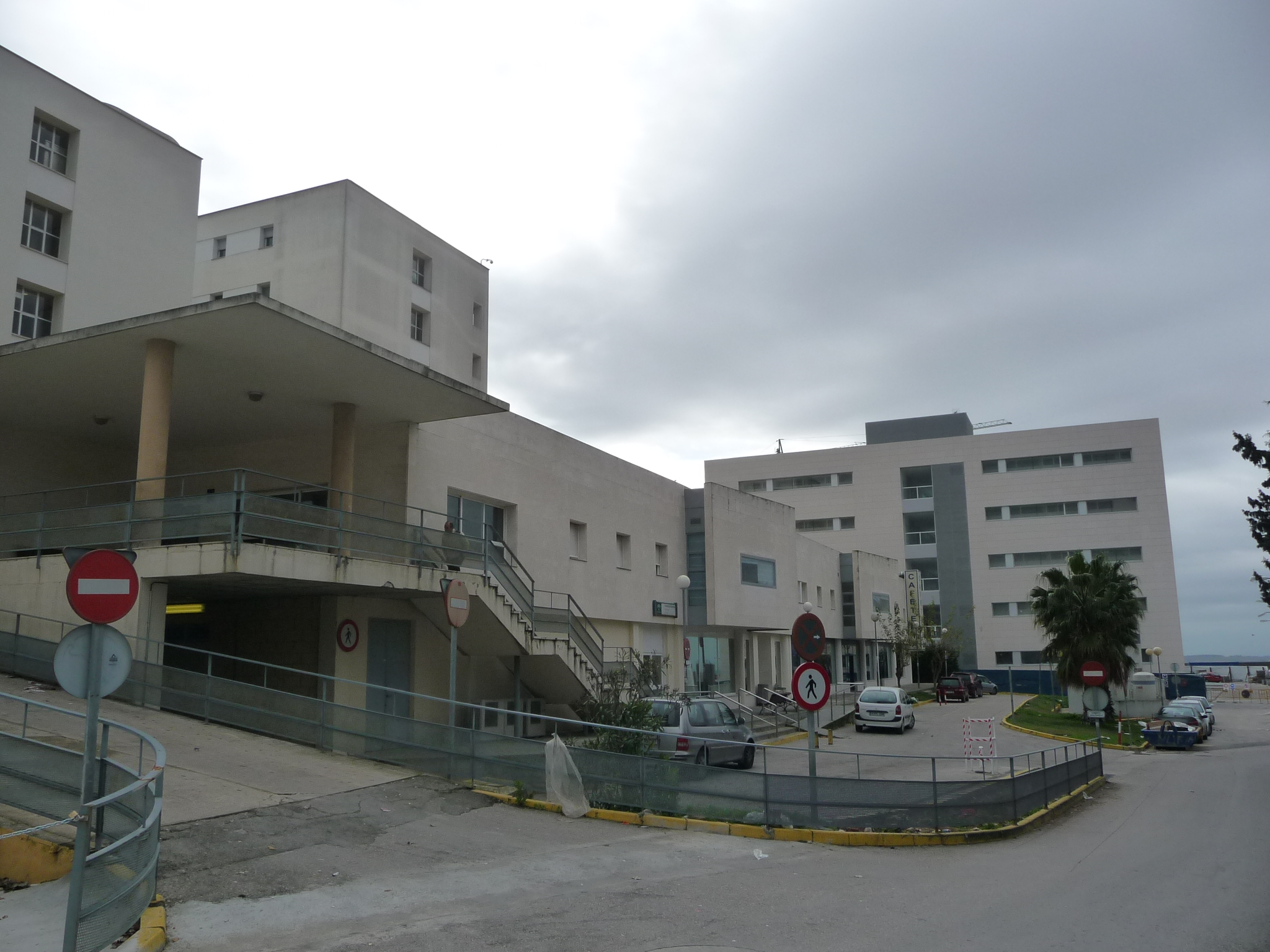 Hospital de Jerez de la Frontera (Andalucía, España)